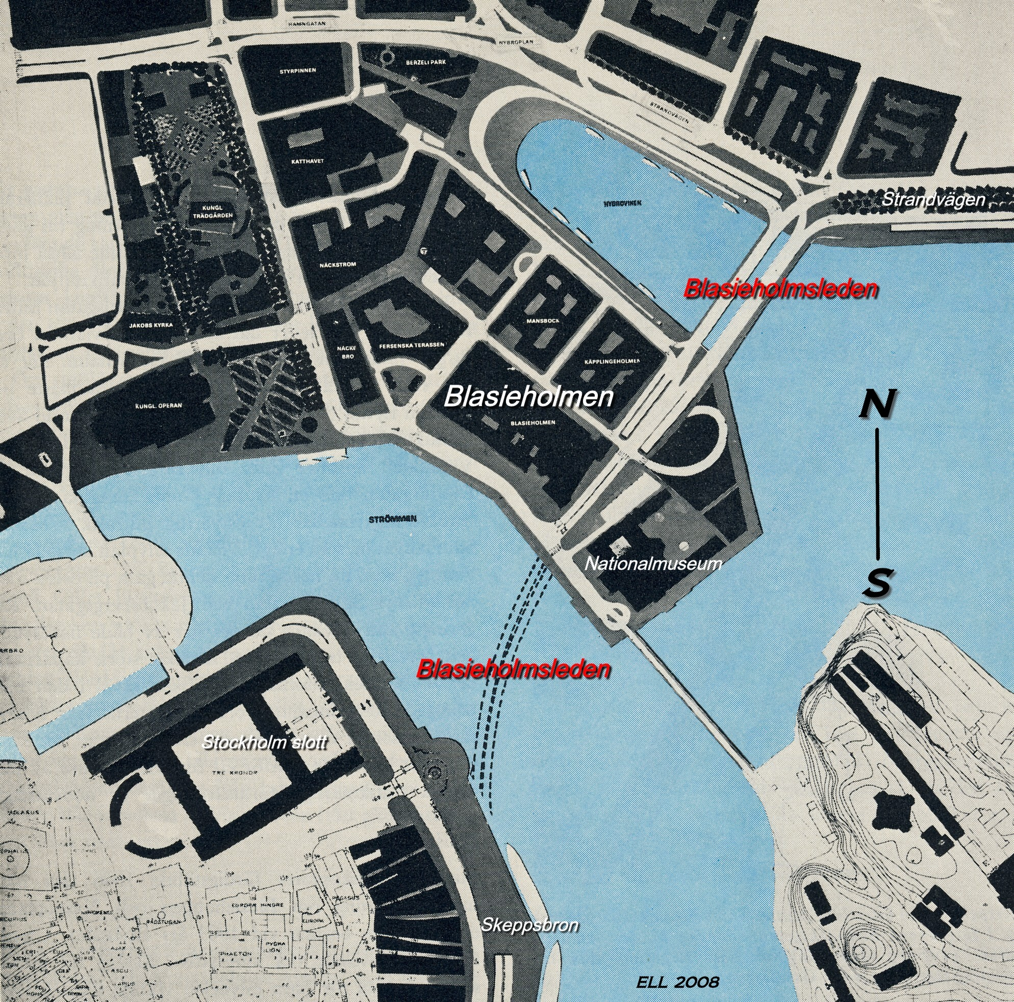 Förslag till Blasieholmsleden i Stockholm 1967